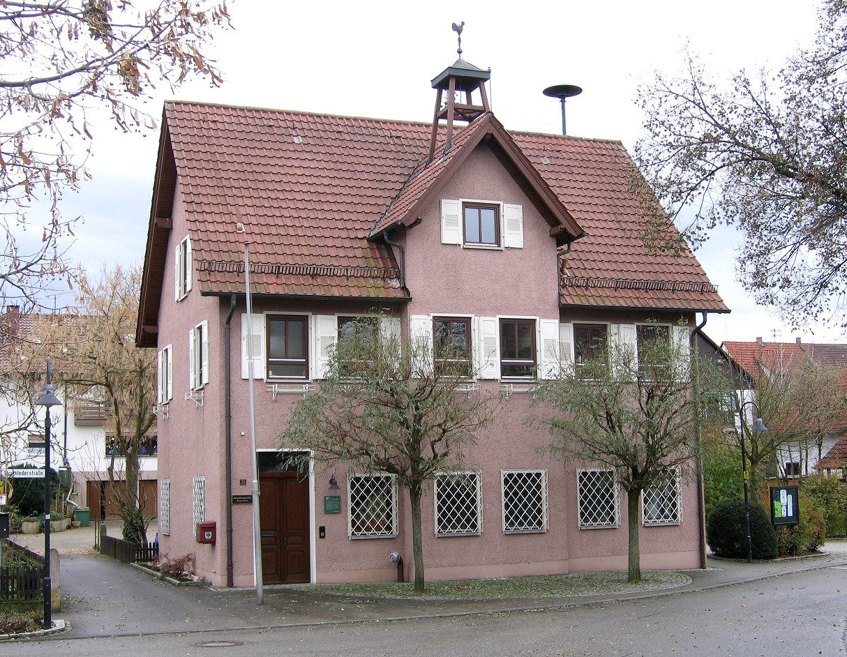 Rathaus in Schozach